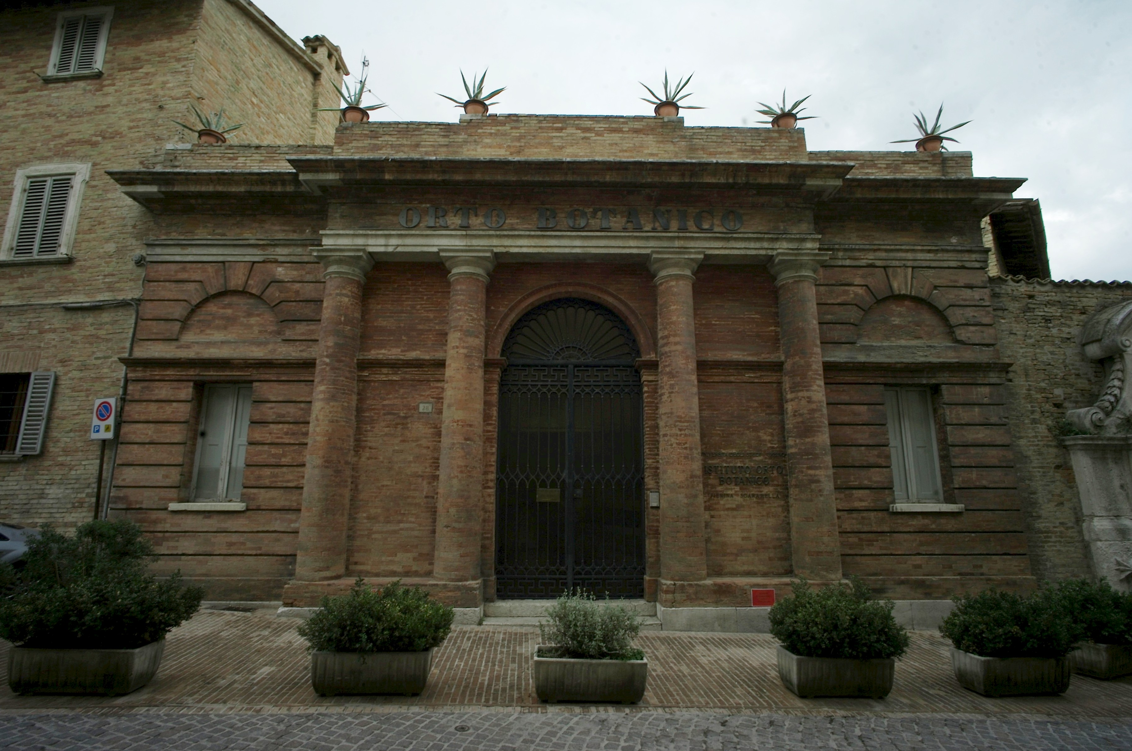 Ingresso principale dell'Orto Botanico di Urbino.